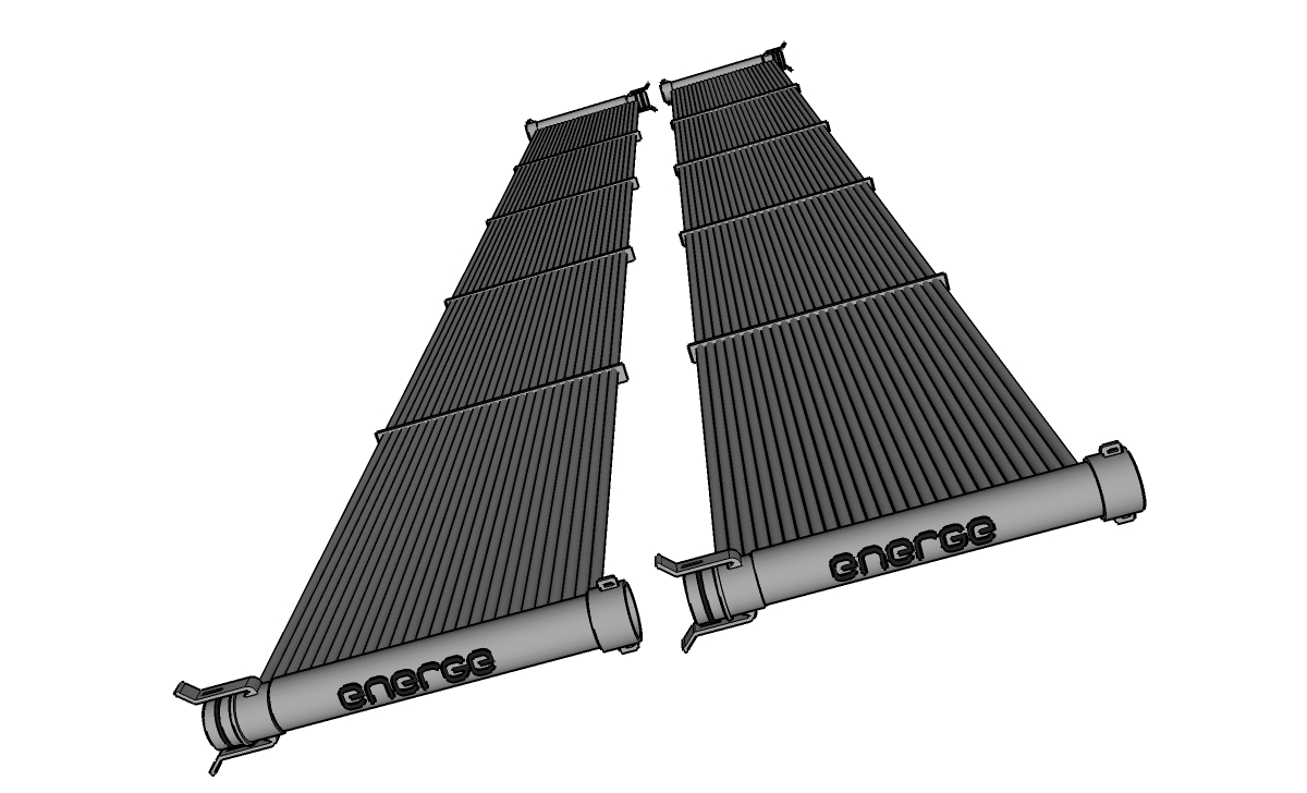 Modulos de colectores de calentamiento solar de piscinas. Detalle de unión